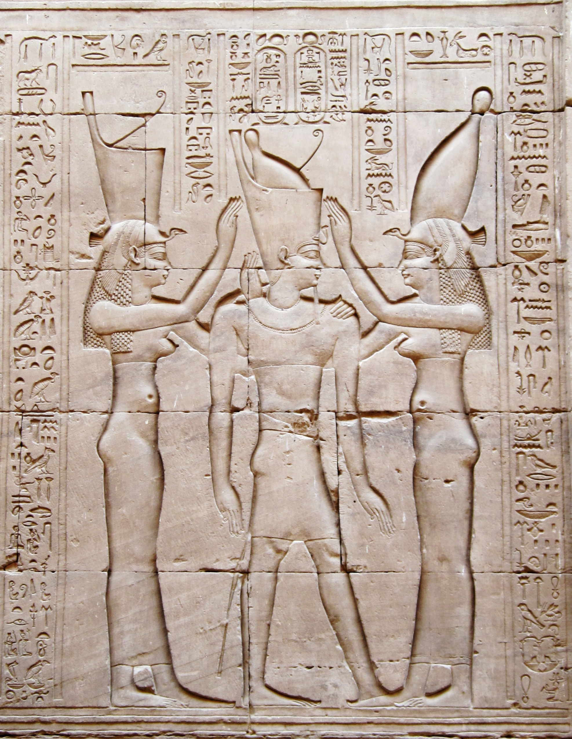 Pharao Ptolemaios VIII, zwischen den Göttinnen Wadjet von Unterägypten (links) und Nechbet von Oberägypten (rechts), Wandrelief im Tempel von Edfu, Ägypten